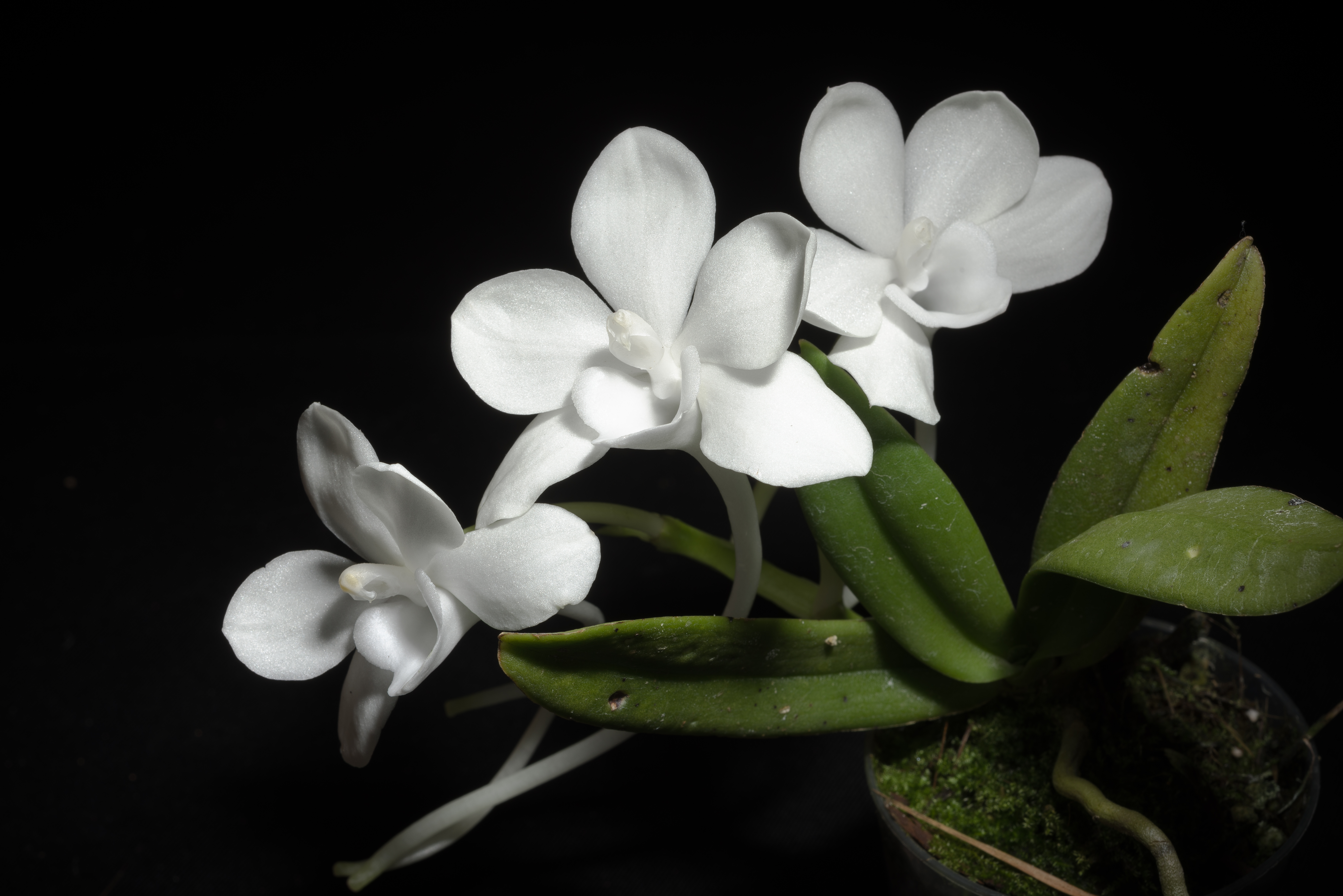 Amesiella monticola